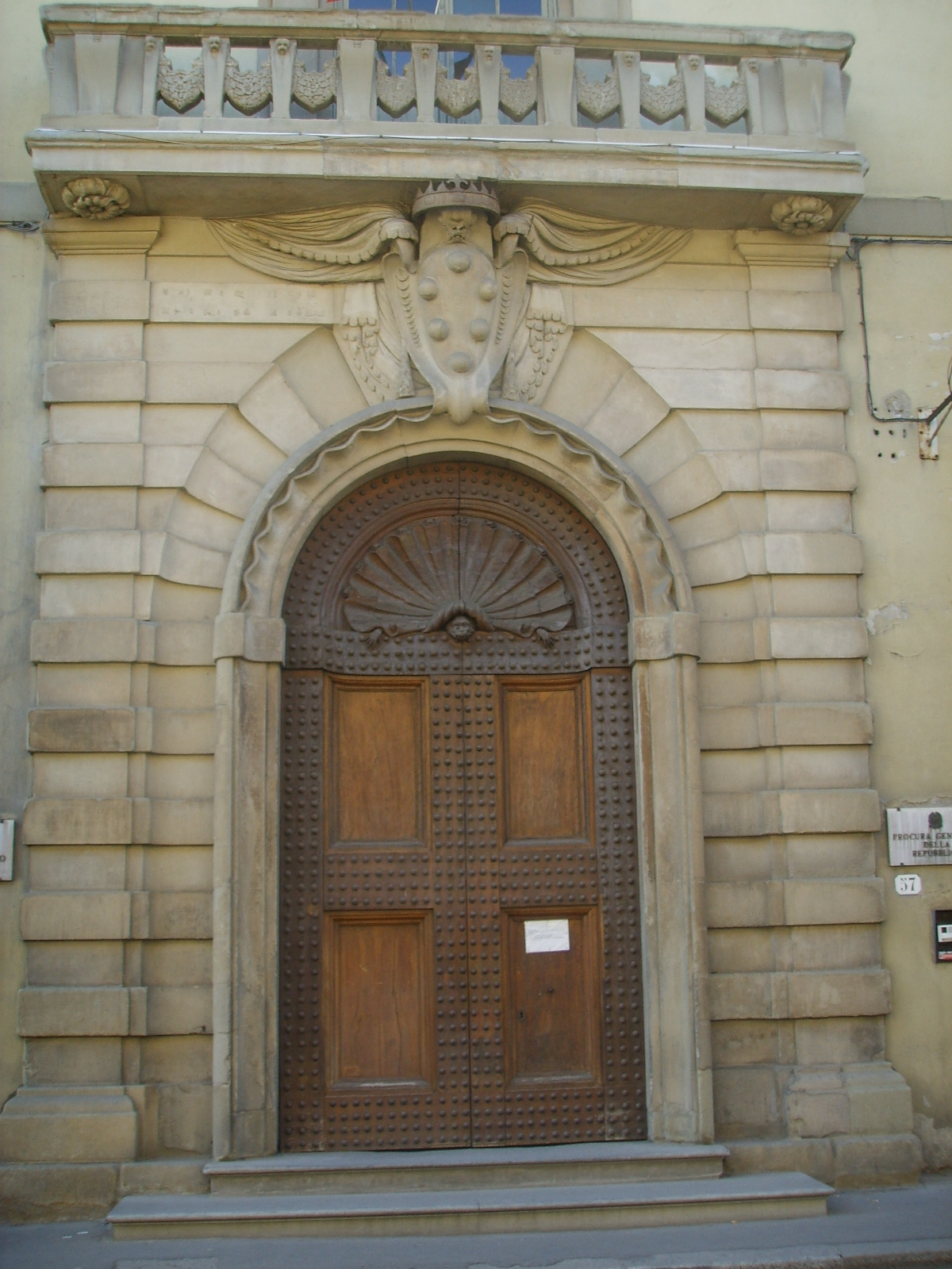 Casino_di_San_Marco,_portal